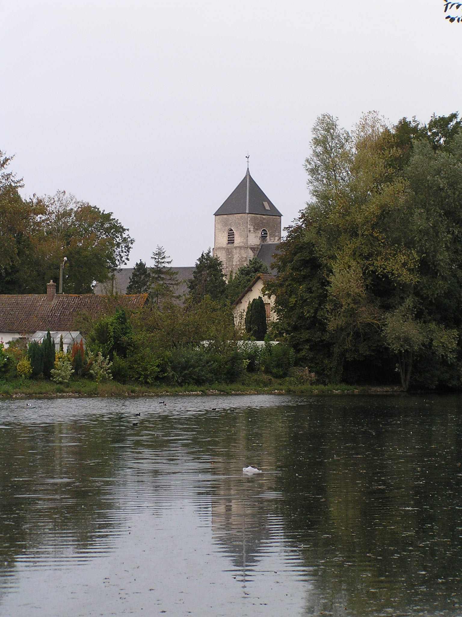 Dannes - 62 Pas de Calais